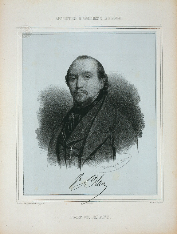 Portrait de Arnold Joseph Blaes, clarinettiste belge